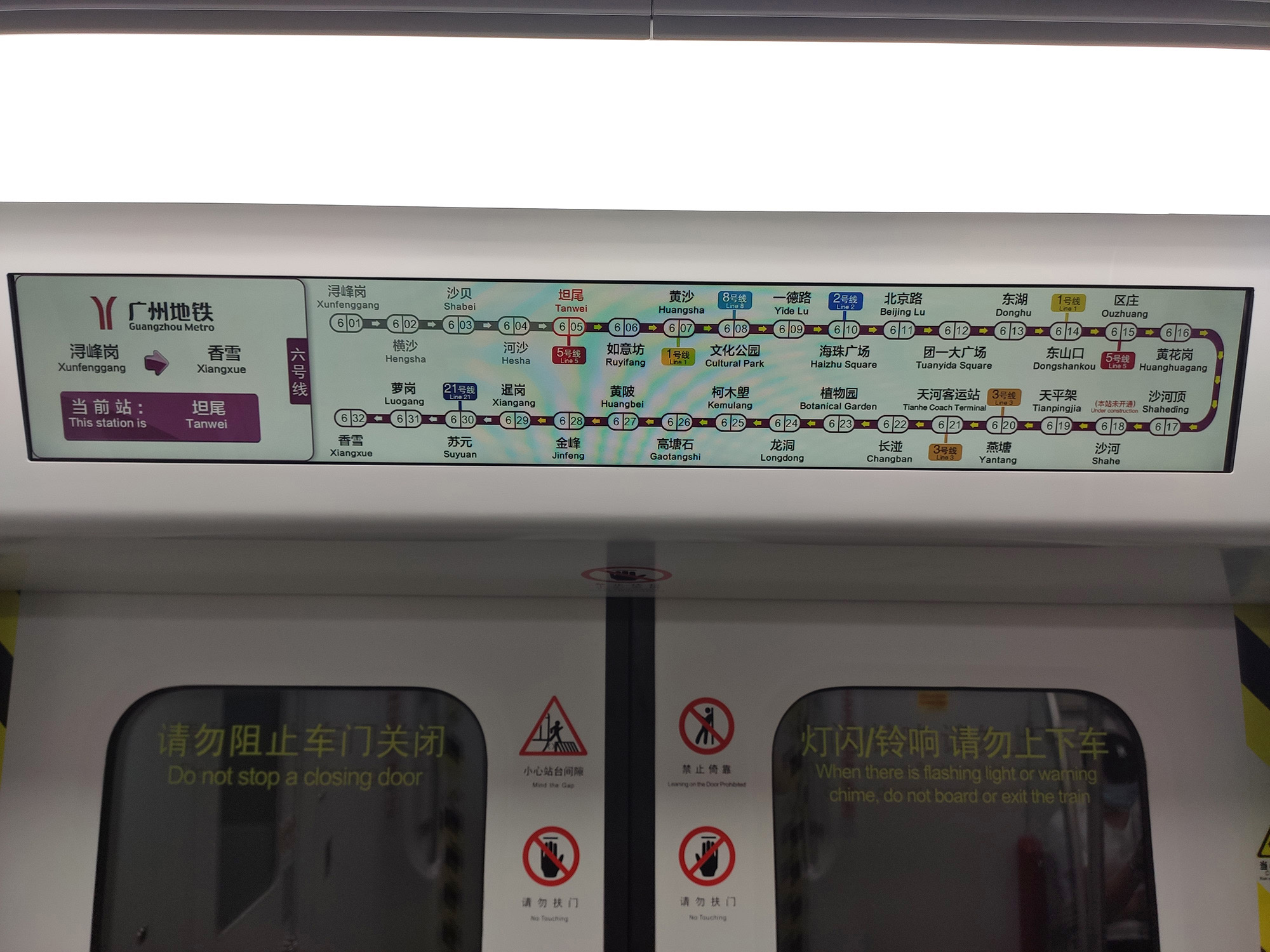 中文（中国大陆）: 广州地铁六号线增购列车LCD导向图